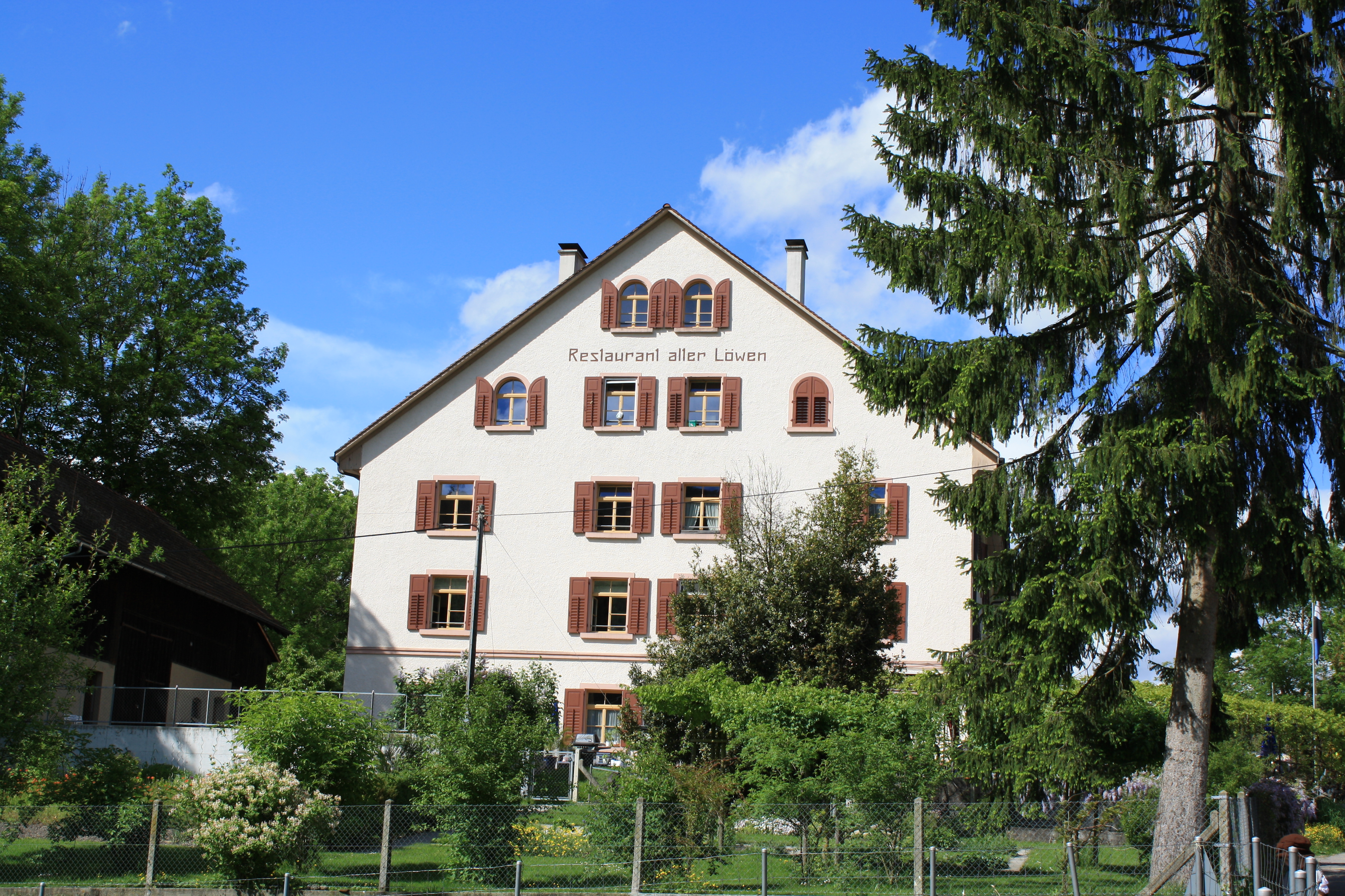 Restaurant Alter Löwen, Wettingen